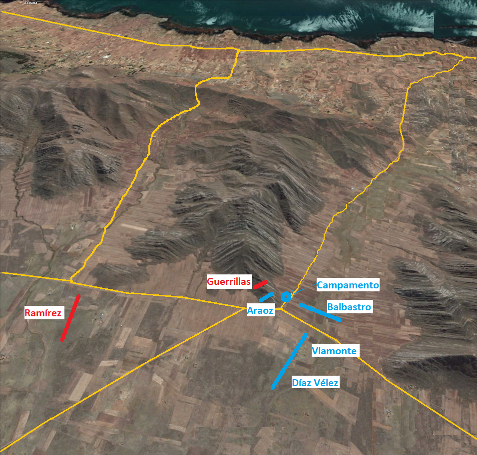 Batalla de Huaqui. Disposición inicial de las fuerzas del Real Ejército del Perú (color rojo) y del Ejercito Auxiliador del Alto Perú (color azul)